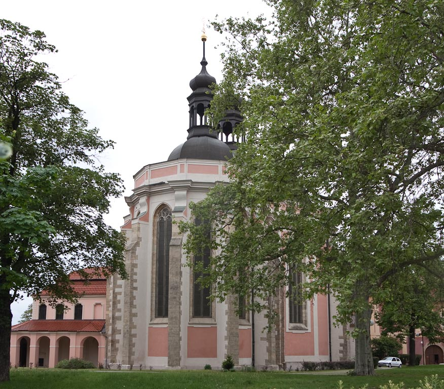 chrám Nanebevzetí Panny Marie a svatého Karla Velikého; 06.05.2009